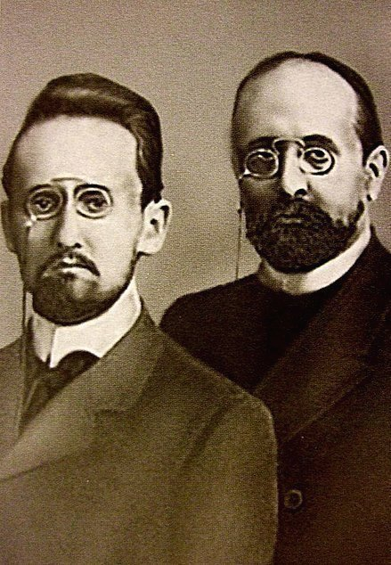 Русские учёные и общественные деятели, братья Сергей Фёдорович Ольденбург (1863-1934) и Фёдор Фёдорович Ольденбург (1861-1914)